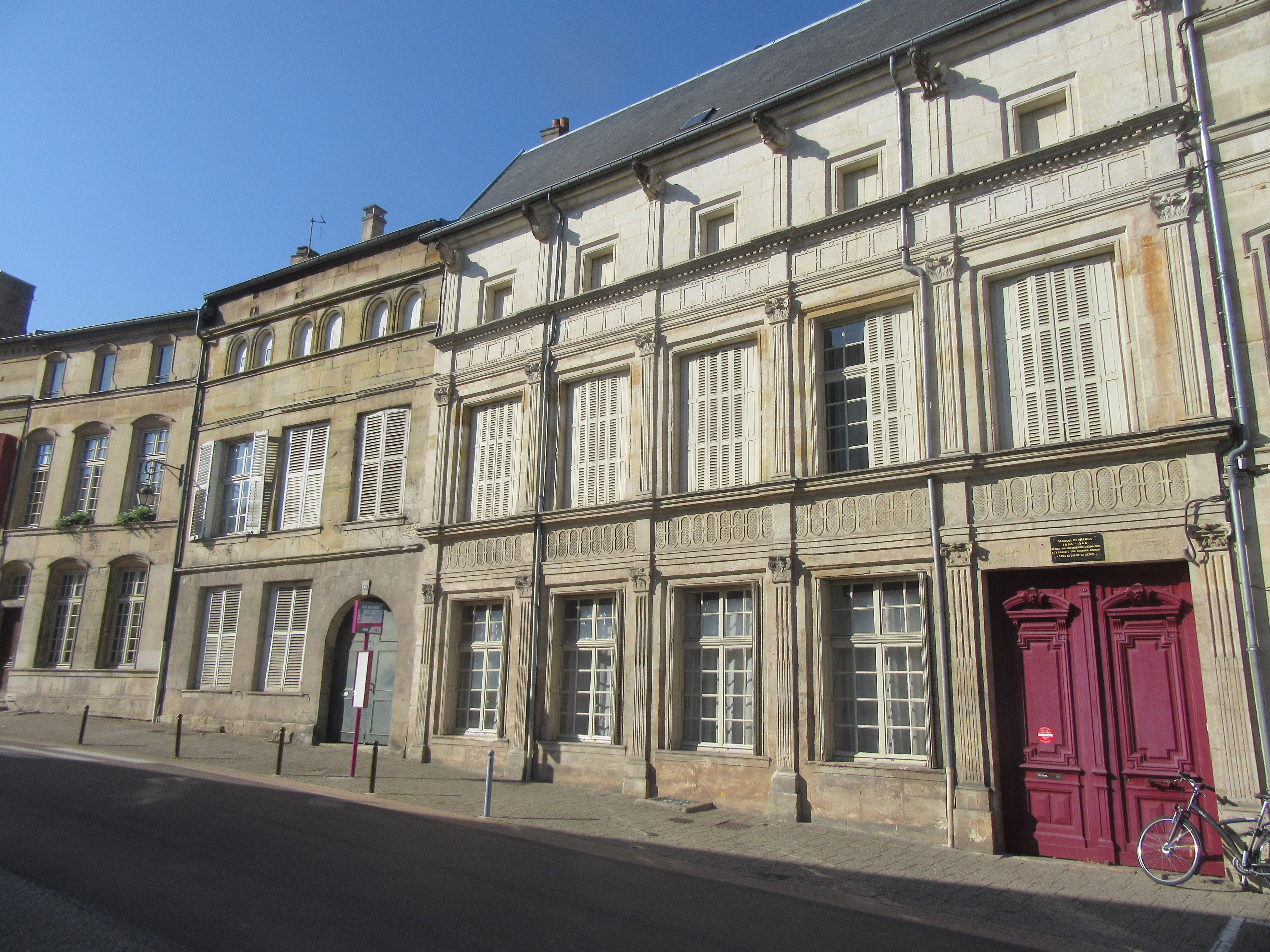 Hôtel de la Bessière : immeuble au 47 de la rue des Ducs-de-Bar à Bar-le-Duc (Meuse), où Georges Bernanos résida de 1924 à 1926 et écrivit son premier roman, Sous le soleil de Satan